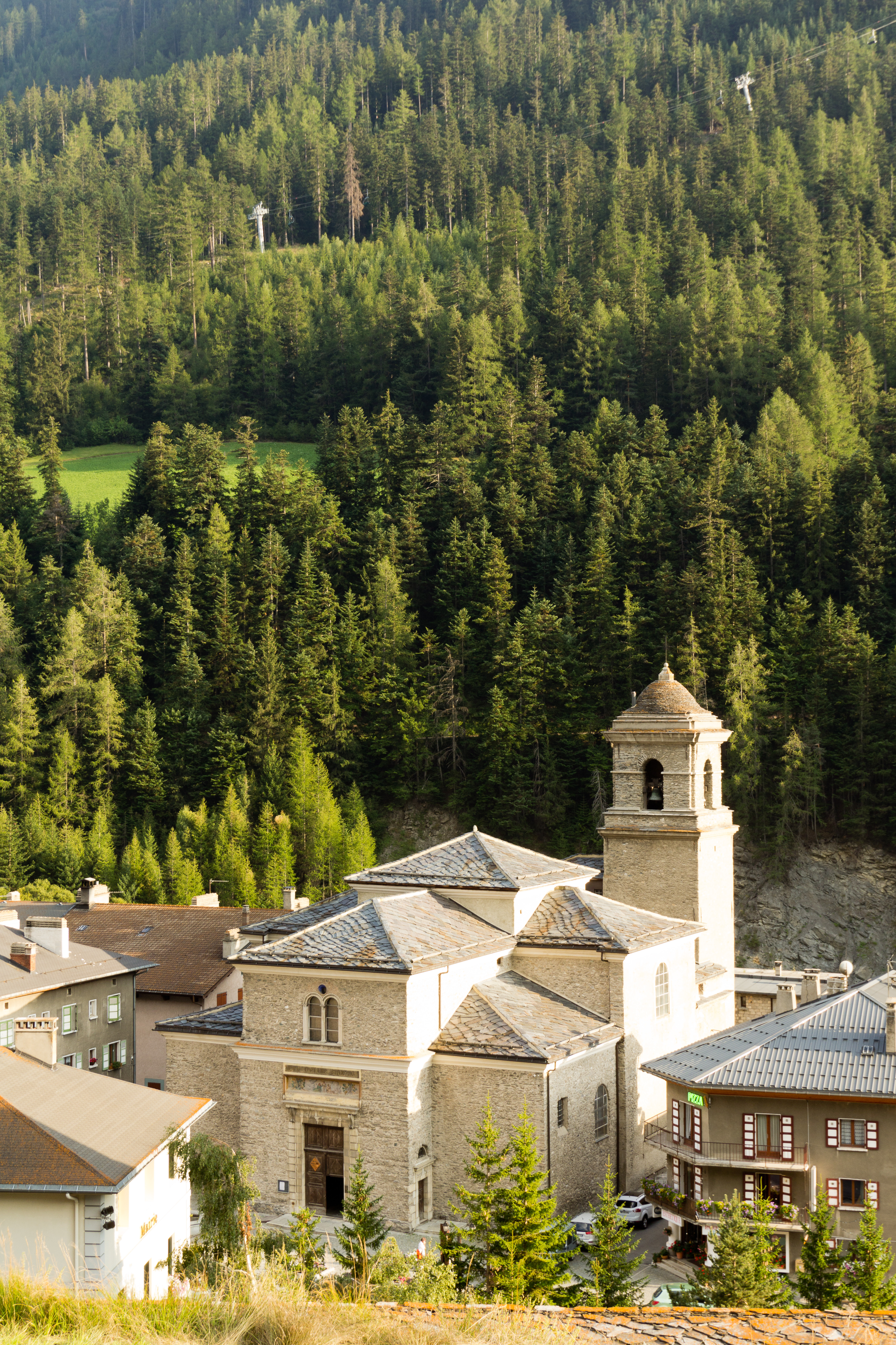 Construction de 1830. .